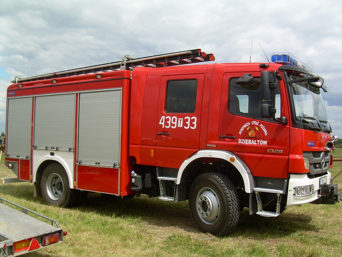 Wóz bojowy OSP Dziebałtów, Mercedes, zdjęcie powstało podczas I Festynu Historycznego w Dziebałtowie.